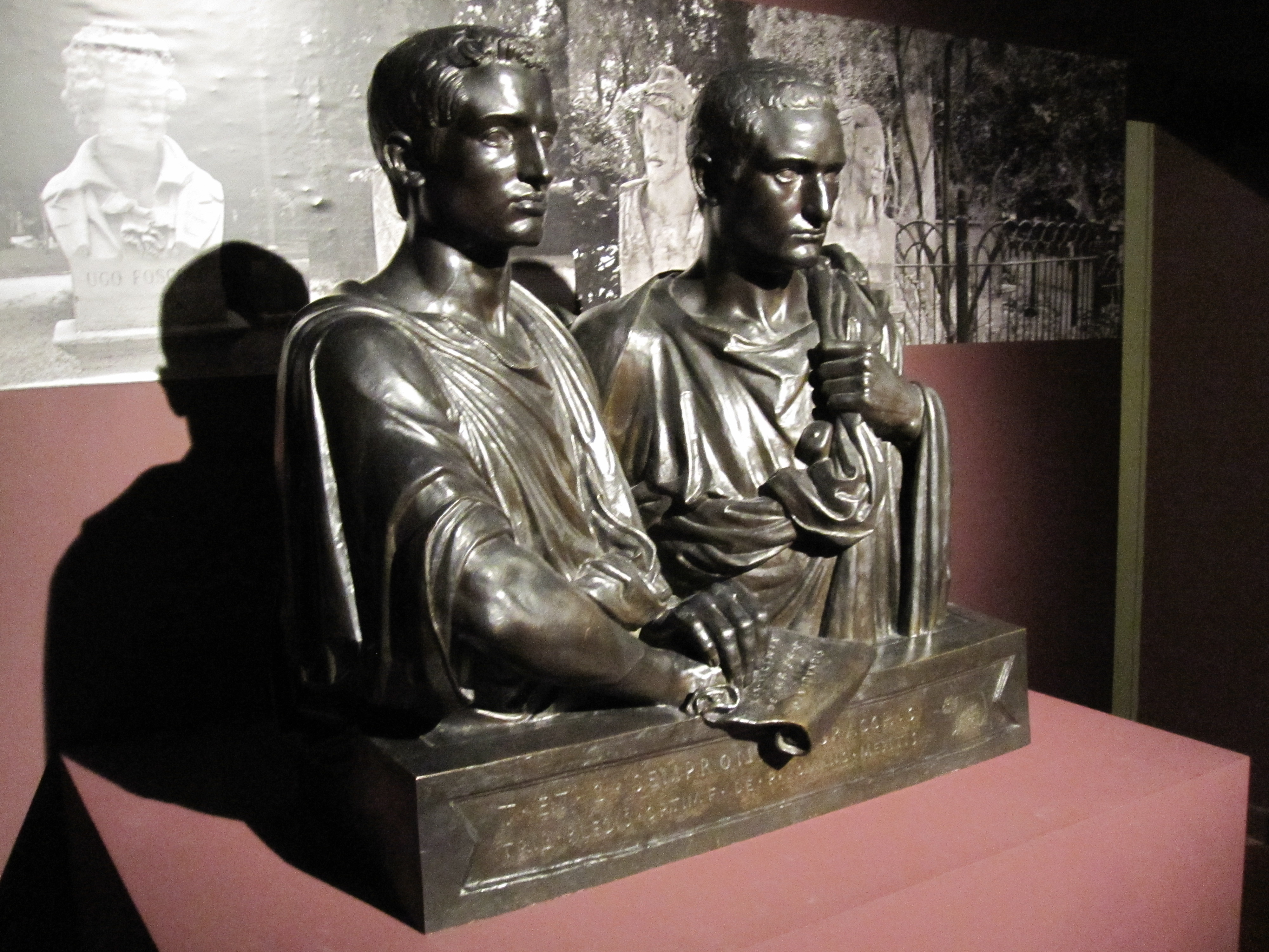 Eugène Guillaume, Tiberius et Gaius Gracchus. Exposition temporaire au Musée Fesch.